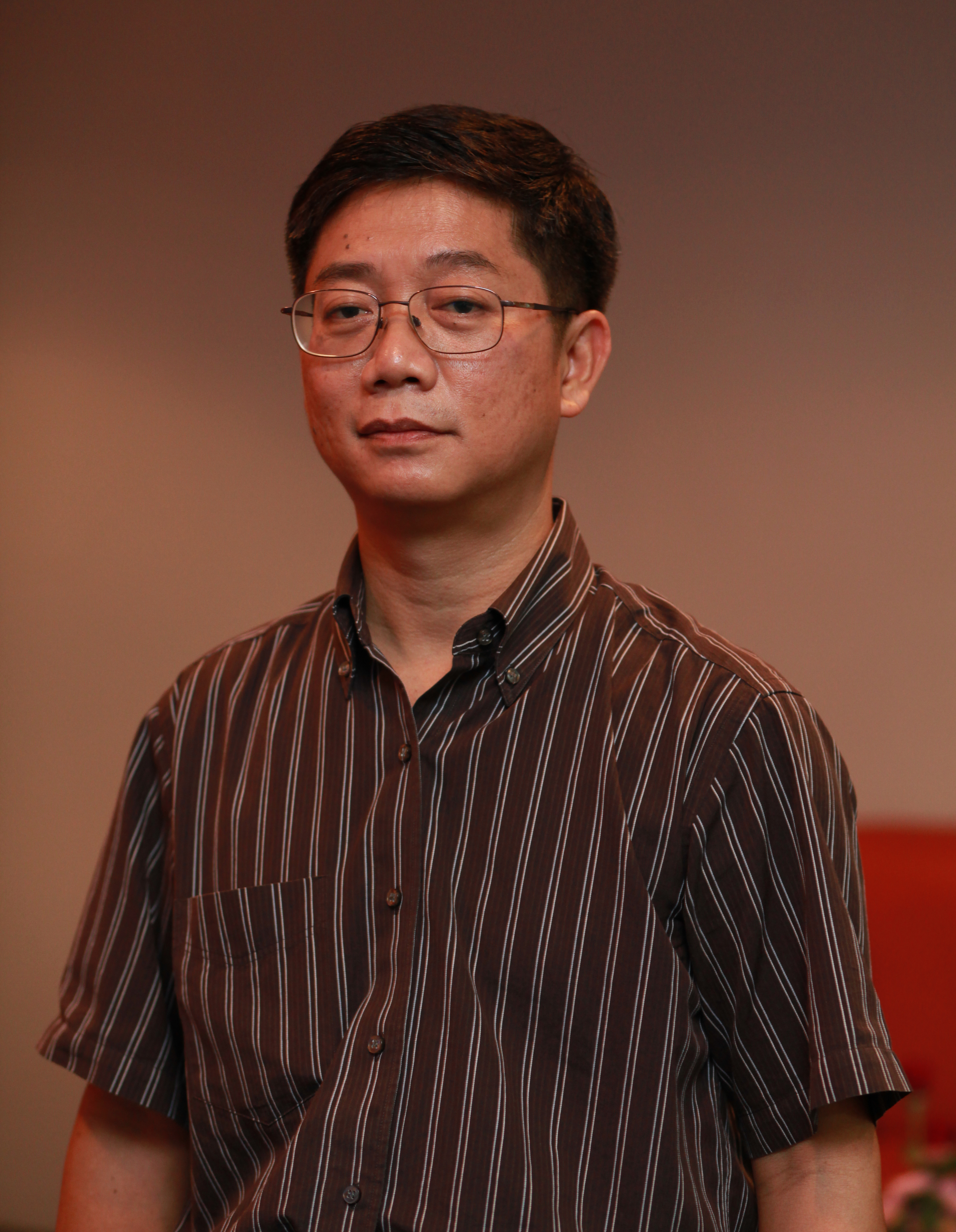 ธำรงศักดิ์ เพชรเลิศอนันต์